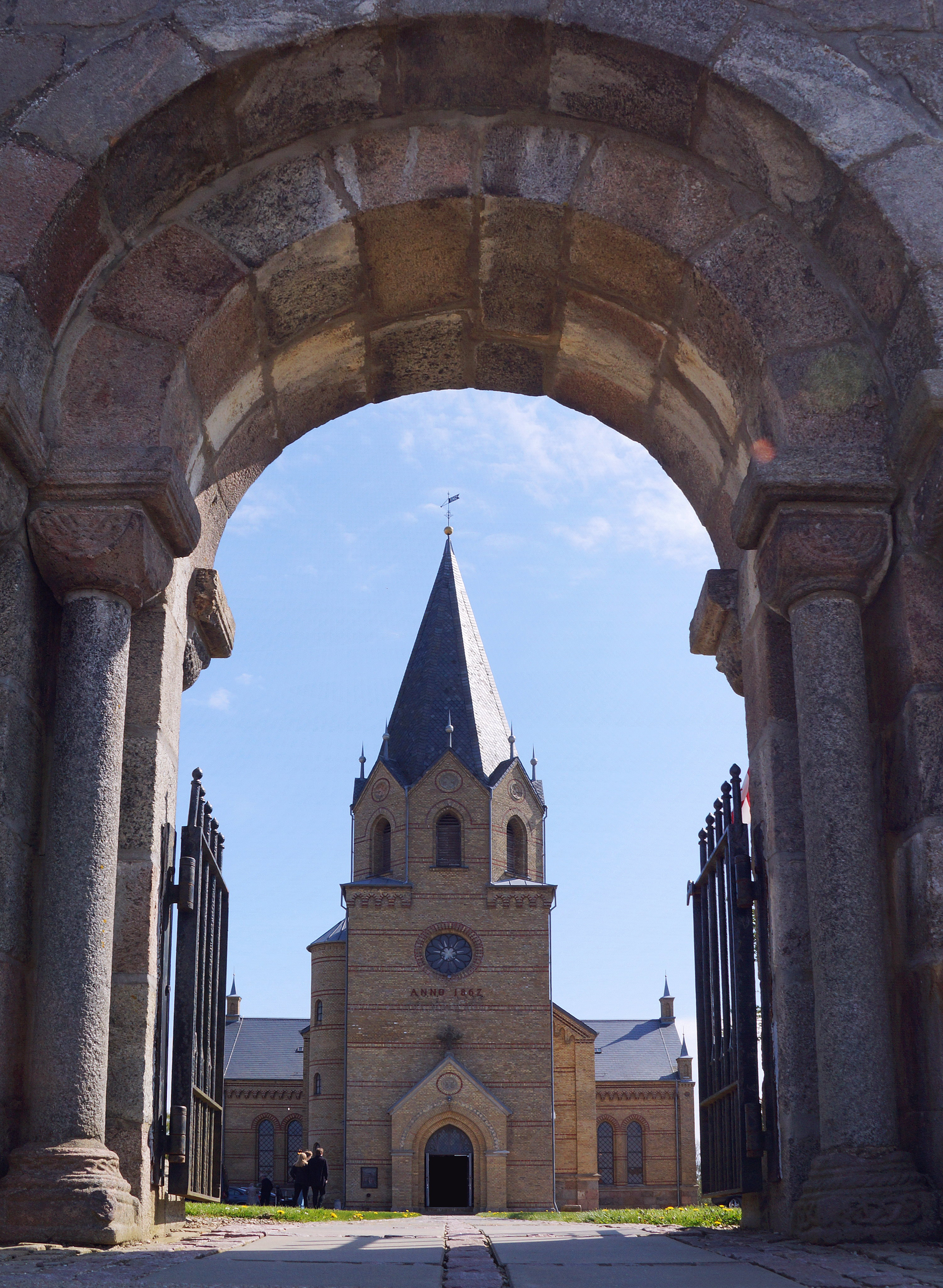 Tyrstrupkirke in Christiansfeld, eine Kirche der dänisch lutherischen Volkskirche südlich des Ortszentrums am Haderslevvej/Kirke Allee, erbaut 1862-1863 - Ansicht von Westen durch das Kirchhoftor. Foto Wolfgang Pehlemann DSC 3542